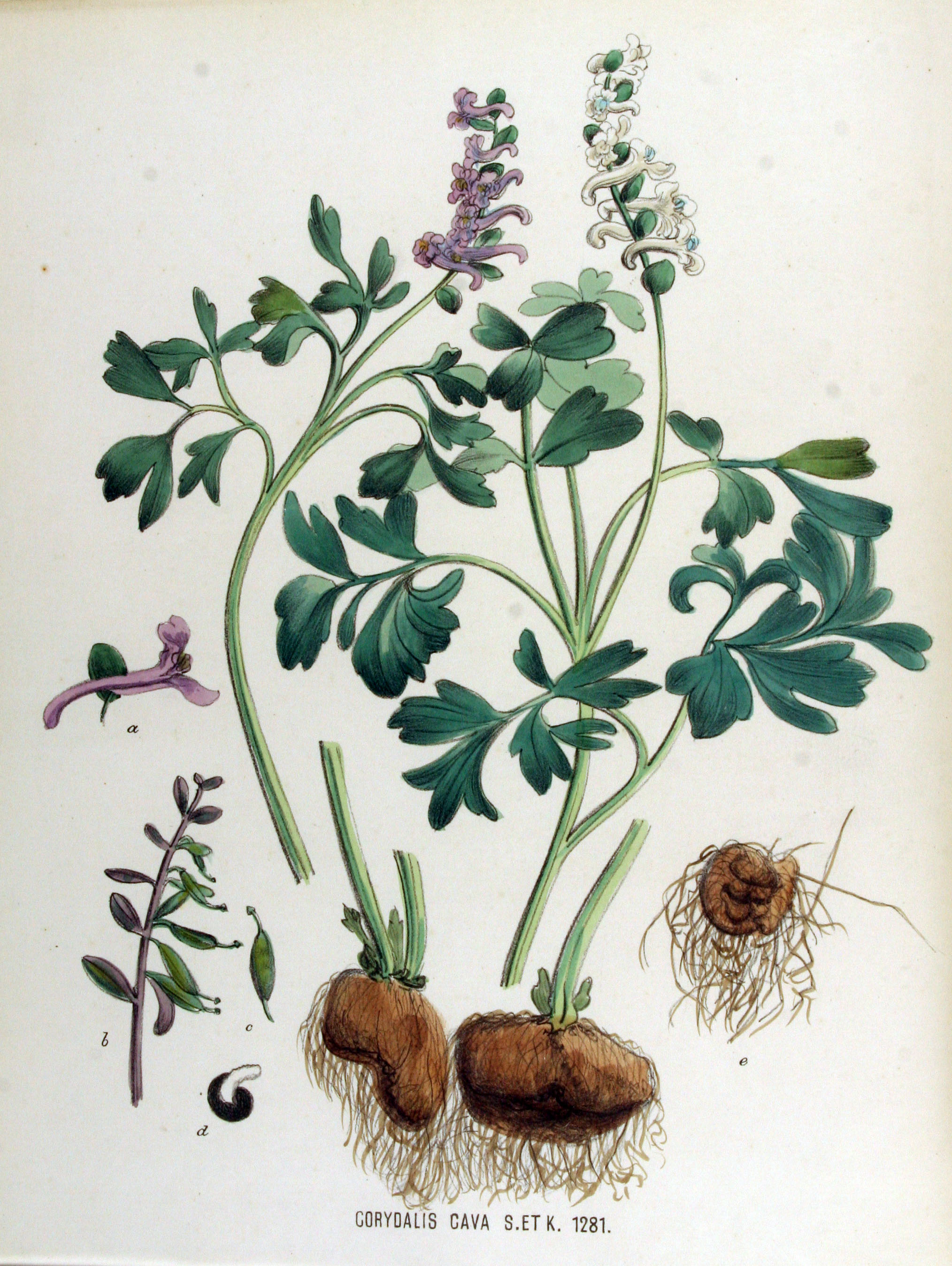 Corydalis cava (L.) Schweigg. & Körte